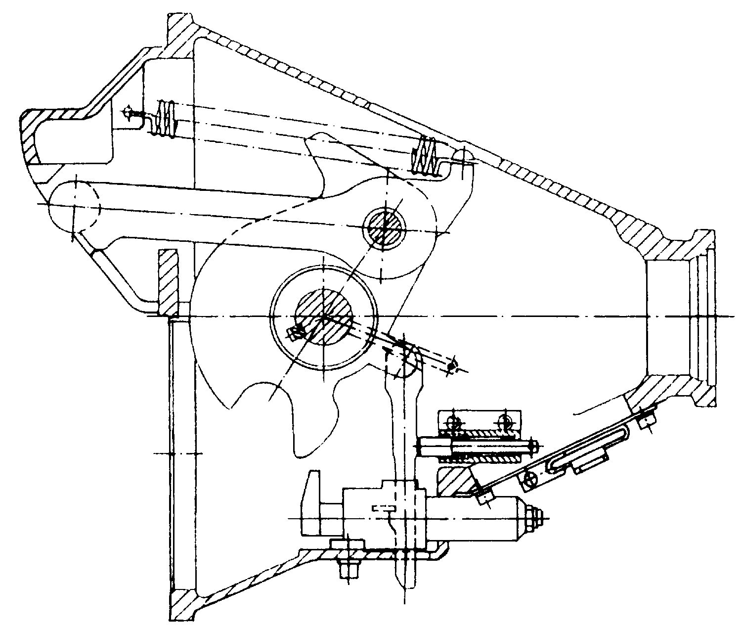 entkuppelte Stellung des Zweistellungsverschlusses einer Scharfenbergkupplung